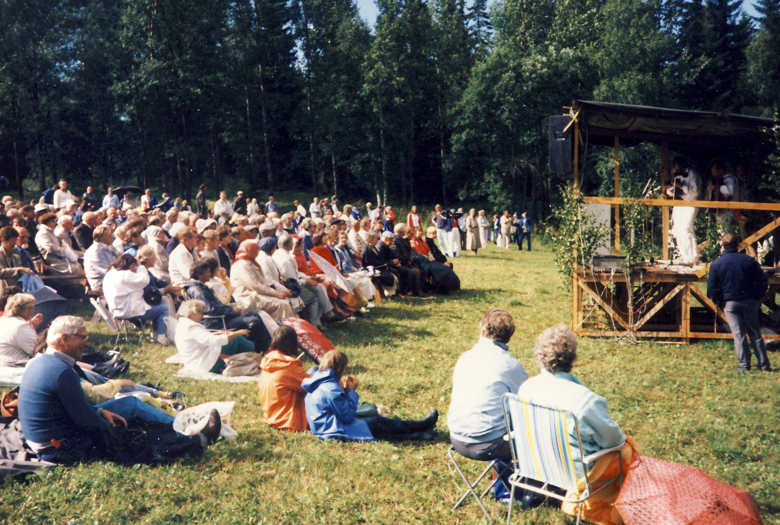 Dan Andersson-festival under Dan Andersson-veckan vid Luossastugan 1985